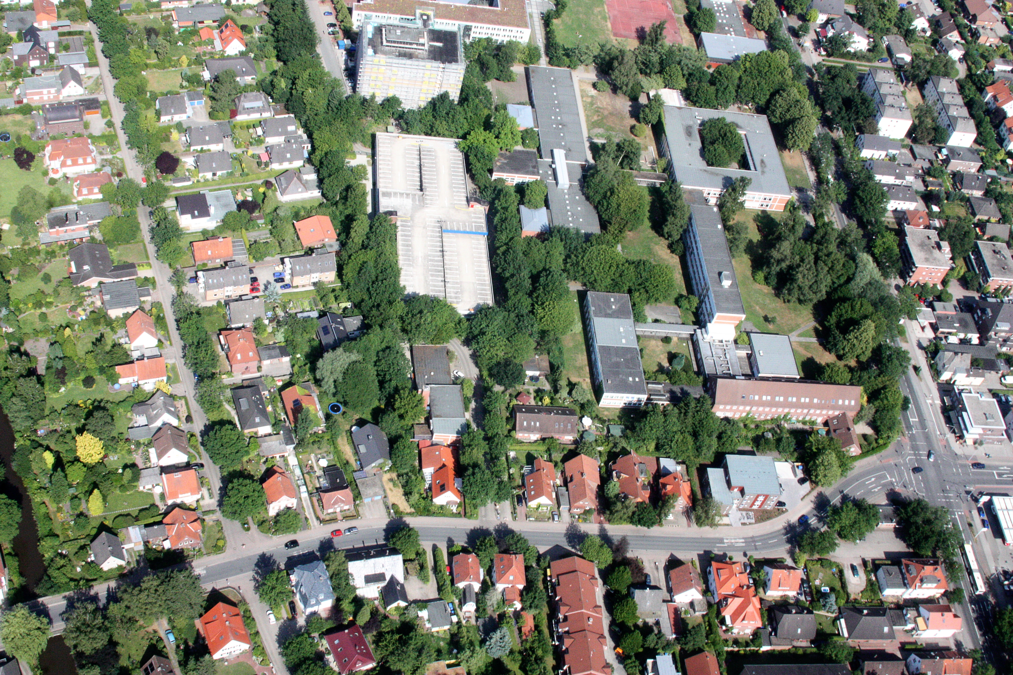 Luftaufnahmen Oldenburg (Oldenburg), mit Weiterflug nach Westen; 1500 Fuß Flughöhe; Juli 2010; Originalfoto bearbeitet: Tonwertkorrektur und Bild geschärft mit Hochpassfilter